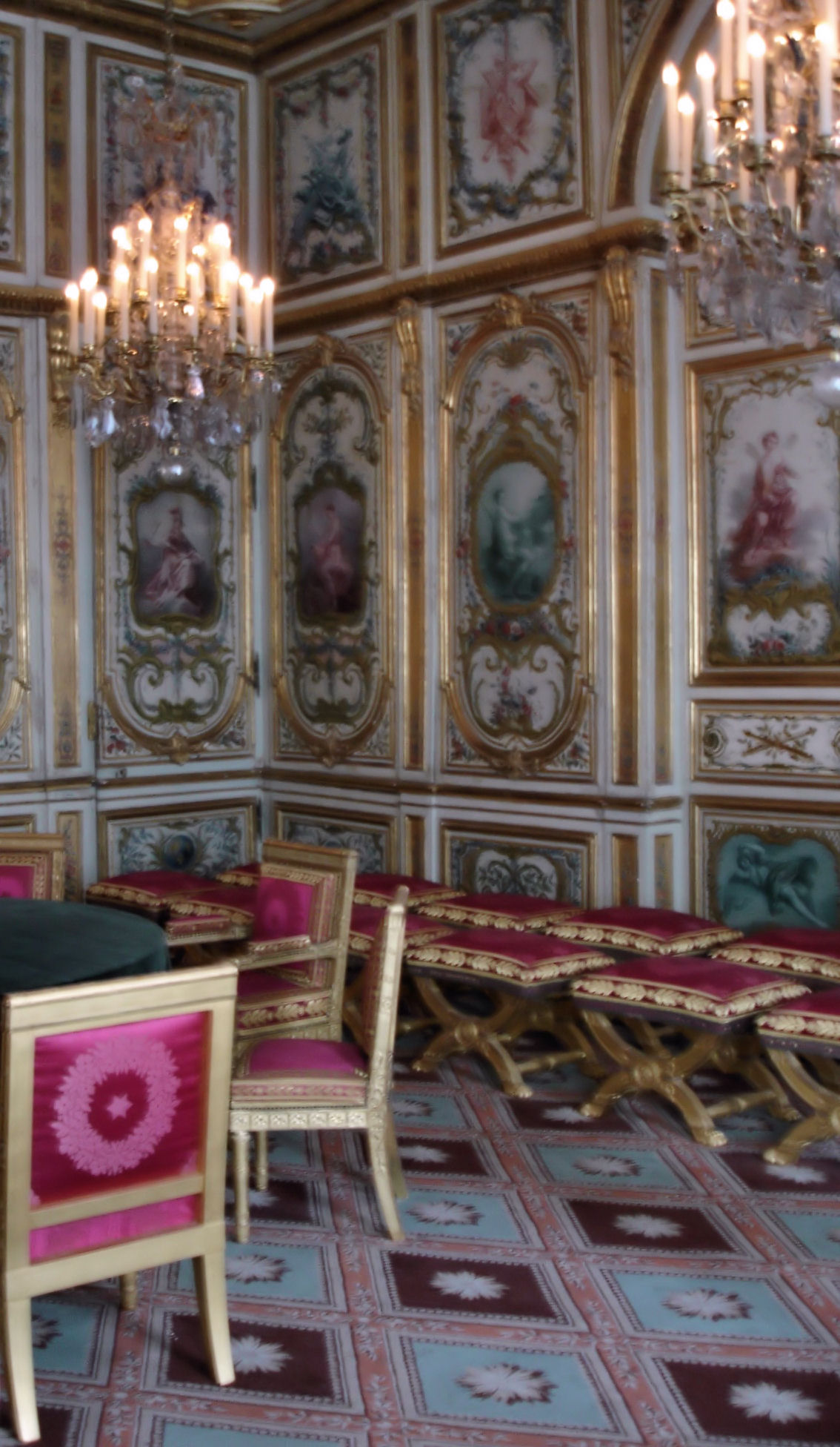 La salle du conseil au château de Fontainebleau (XVIIIe siècle)